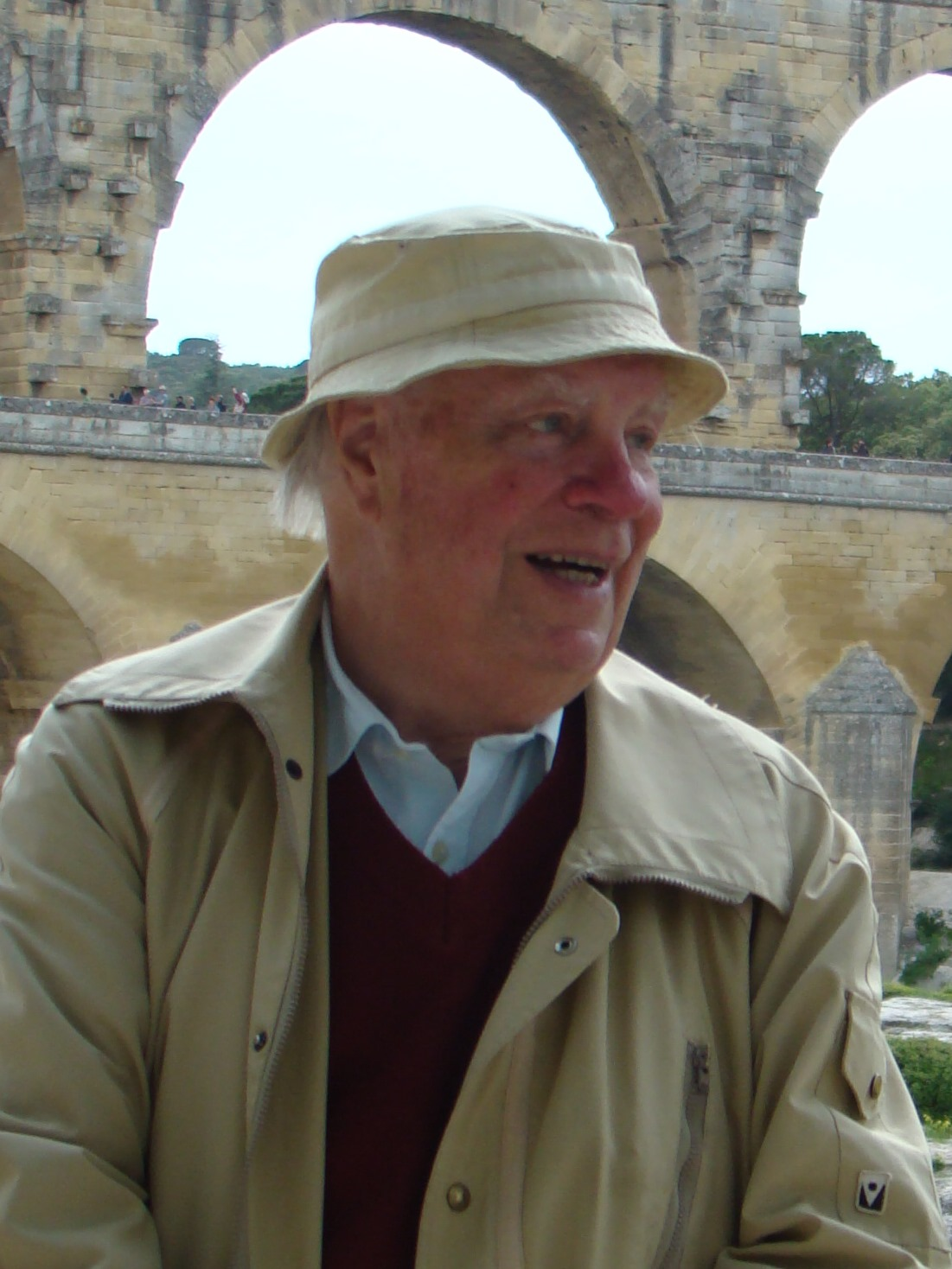 portrét